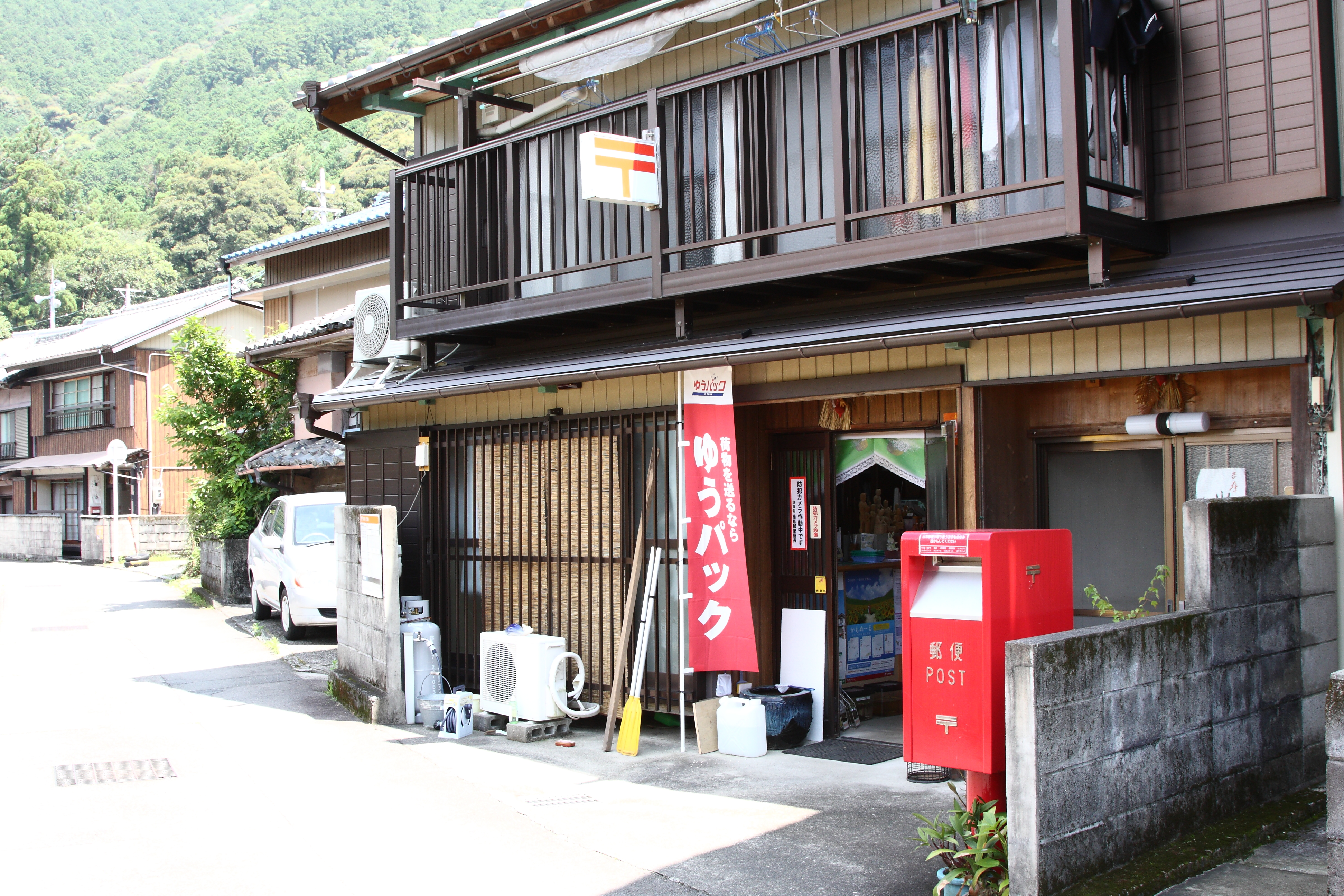 須賀利簡易郵便局 三重県尾鷲市須賀利町